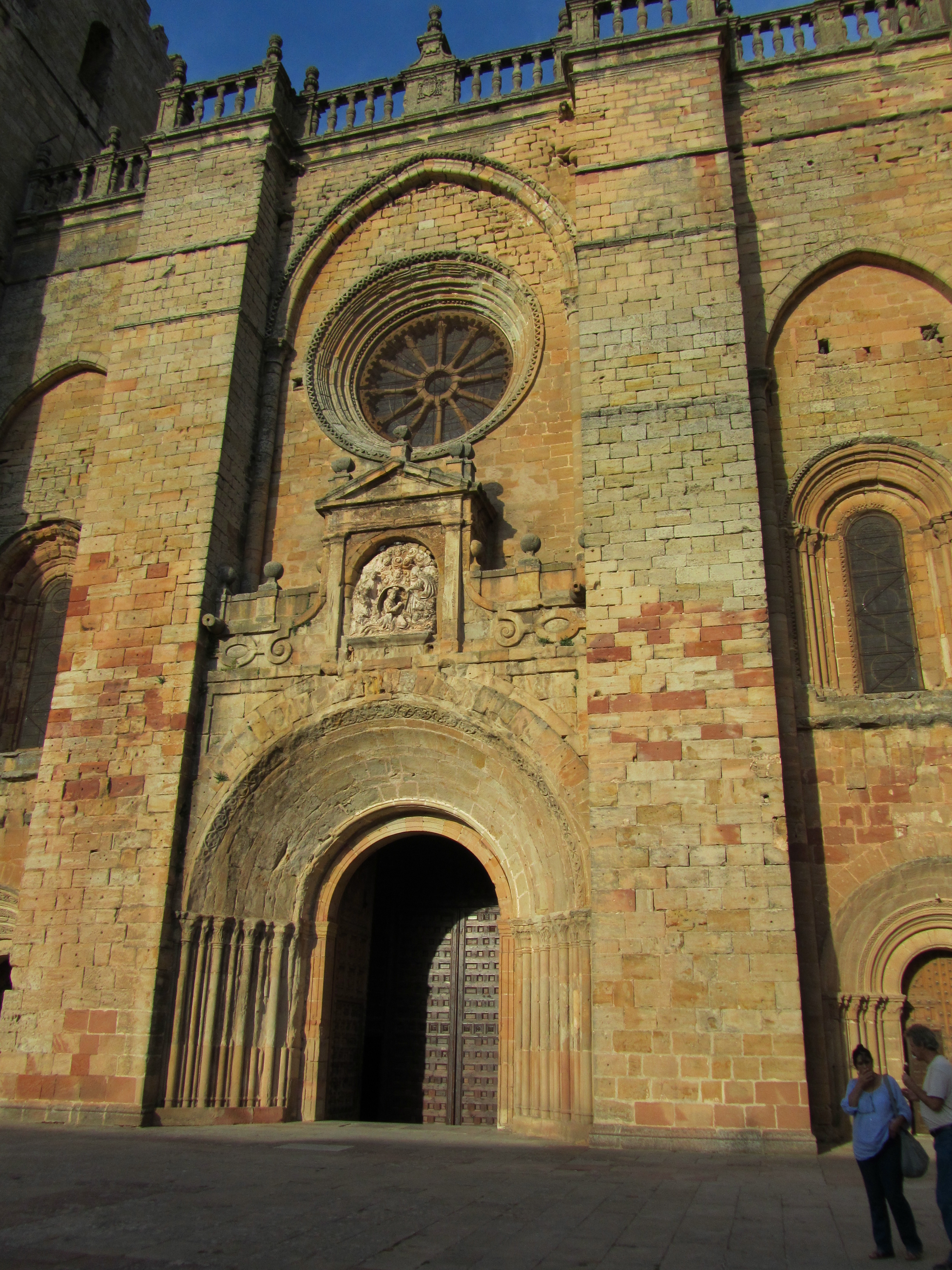 Fachada principal con la puerta central de la catedral de Sigüenza (Spain)